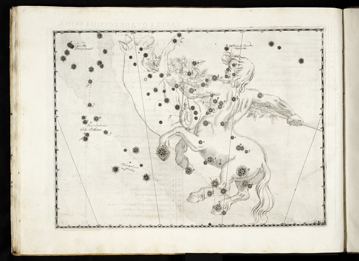 La constelacion de Centaurus en la obra Uranometria